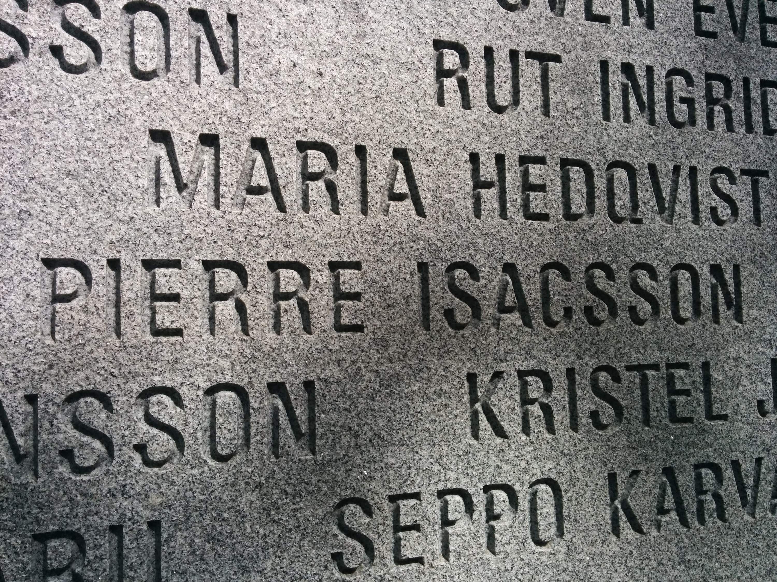 Bild av Pierre Isacssons namn på Estoniamonumentet i Stockholm.